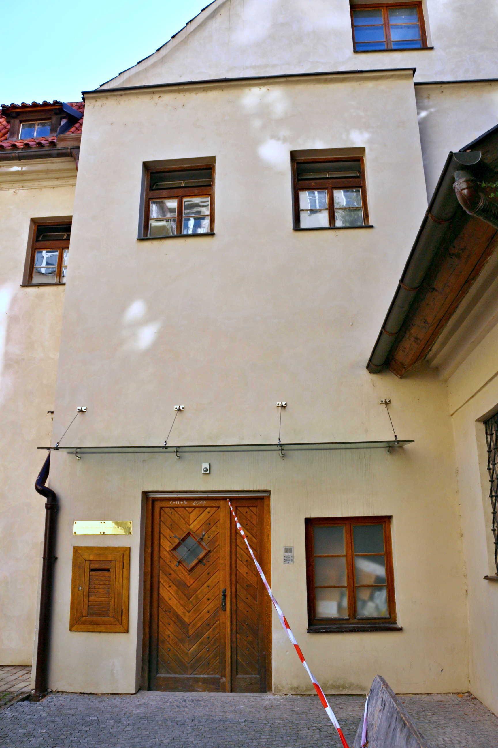 Františkánská zahrada